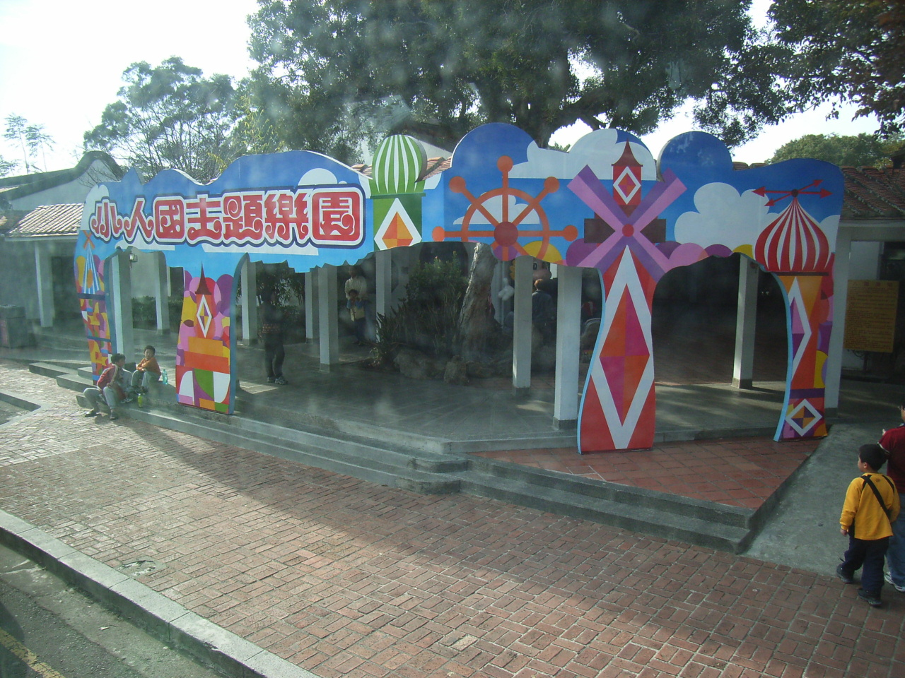 從遊覽車上俯瞰小人國主題樂園。